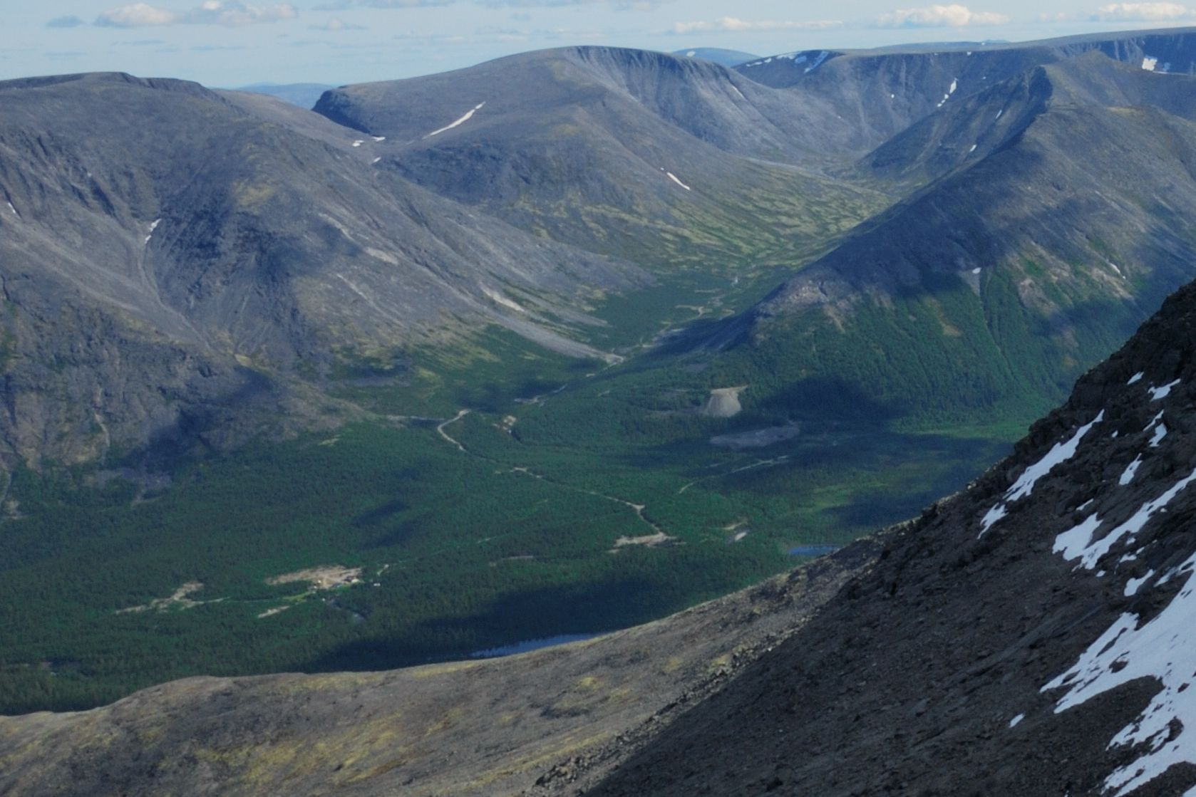 Blick auf Kuelporr (links im Tal), rechts davon liegt der Schuttkegel eines gesprengten Bergrückens.